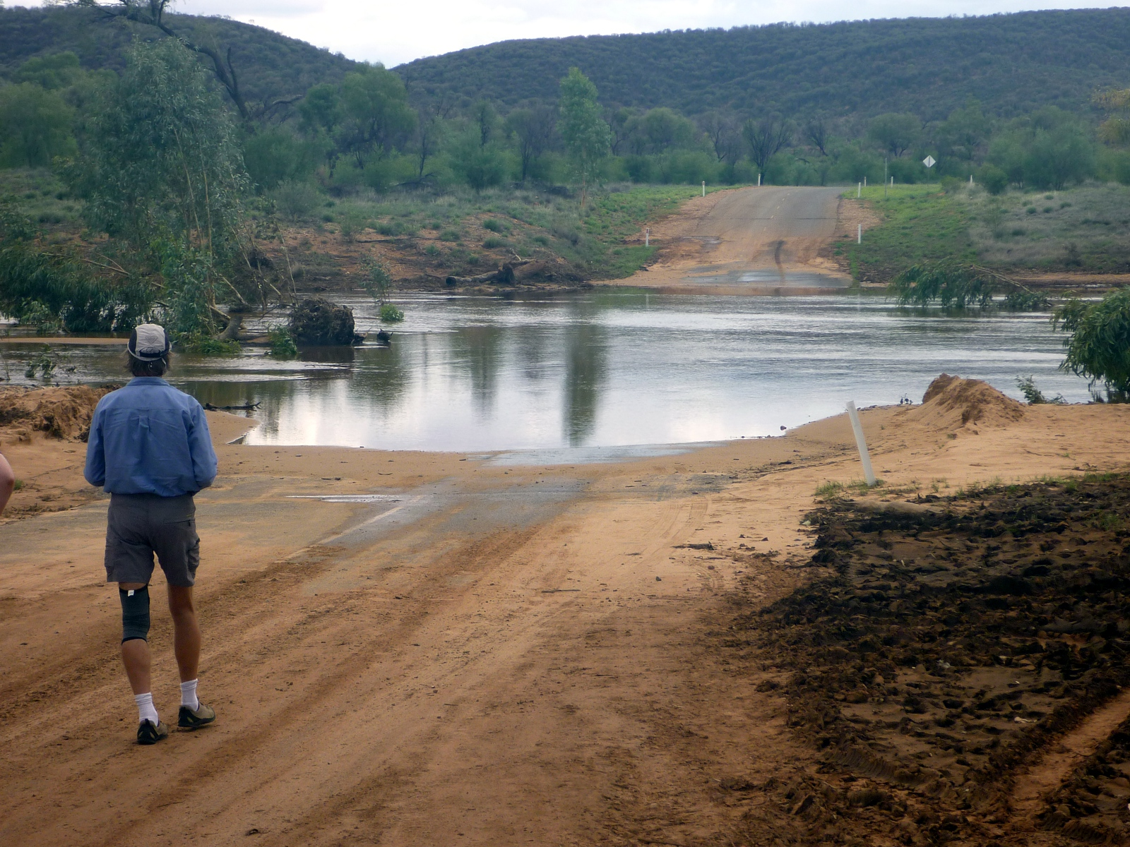 Überschwemmte Furt am Larapinta Drive (Alice Springs - Hermannsburg)